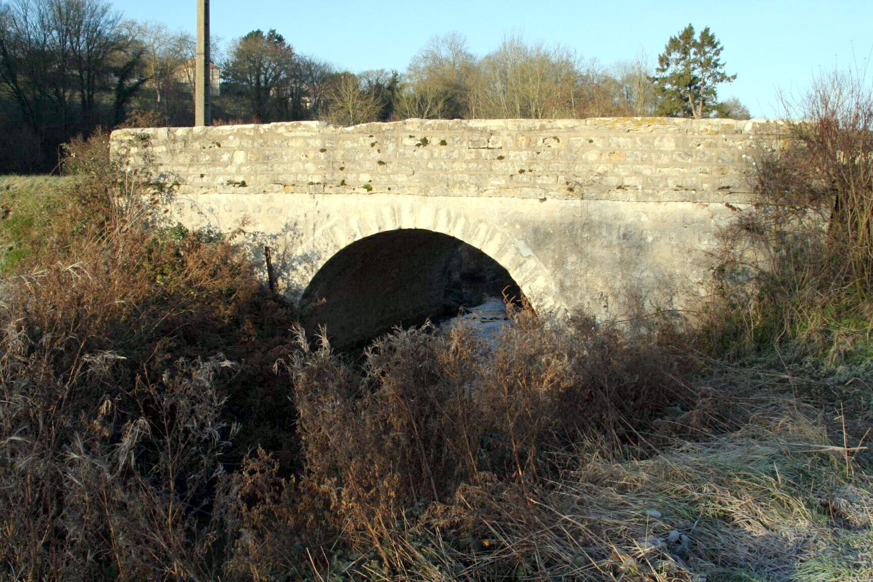 Pont ancien sur le ru de Flexanville à Septeuil - Yvelines (France)